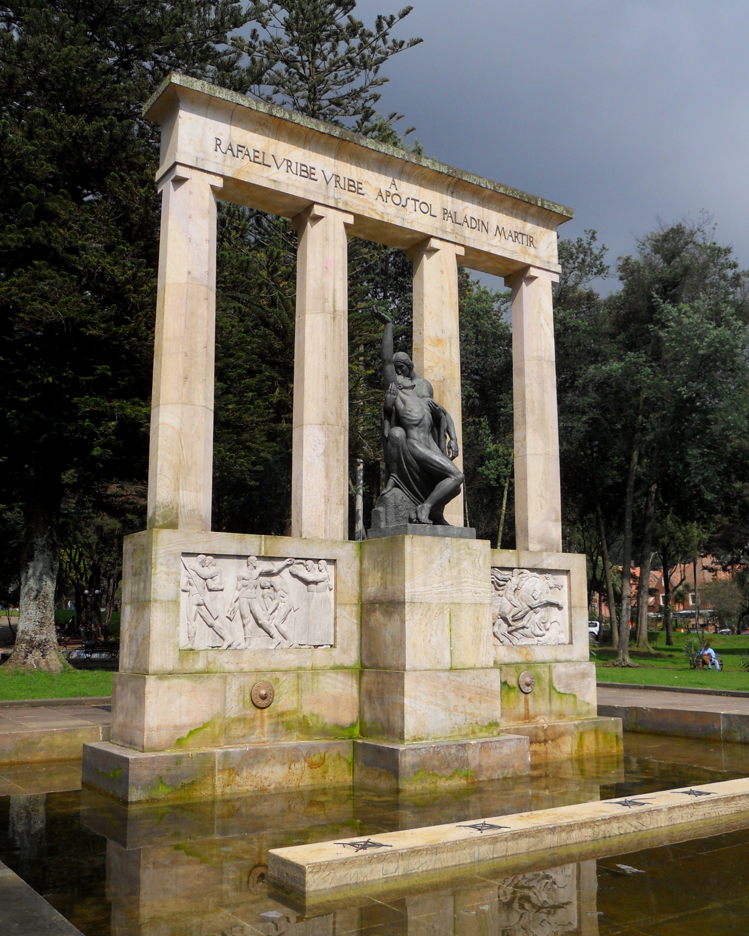 Monumento a Rafael Uribe Uribe en el parque Nacional de Bogotá.